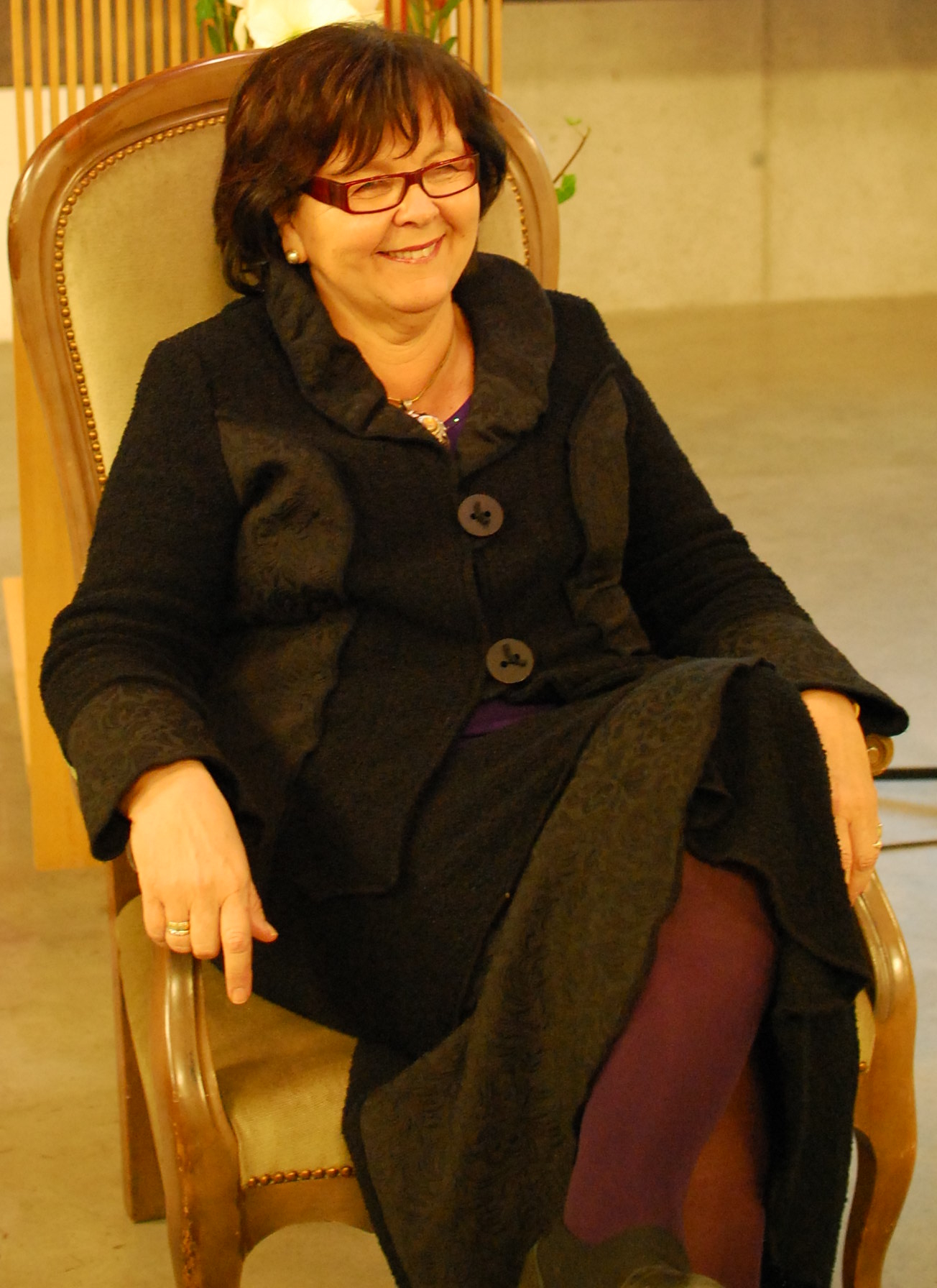 Der richtige Sessel für die Gratulantin